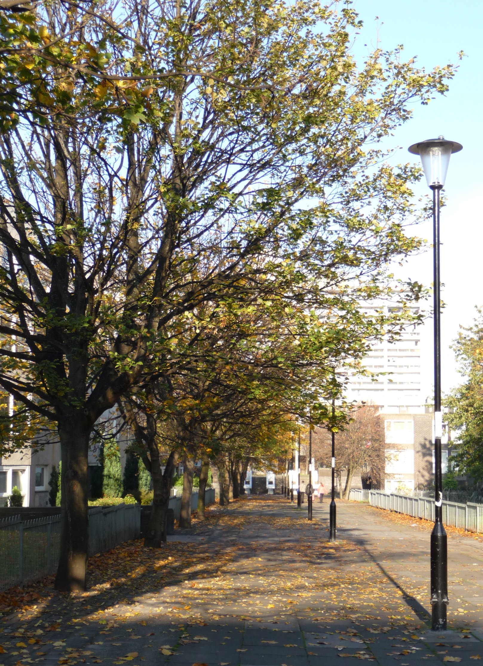 Kirkgate, Leith Nov 2011